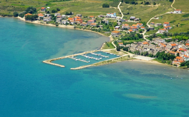 Ljubač